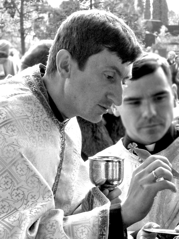 Український релігійний діяч, священник УГКЦ, перший доктор біблійного богослов'я з України о. Іван Січкарик.